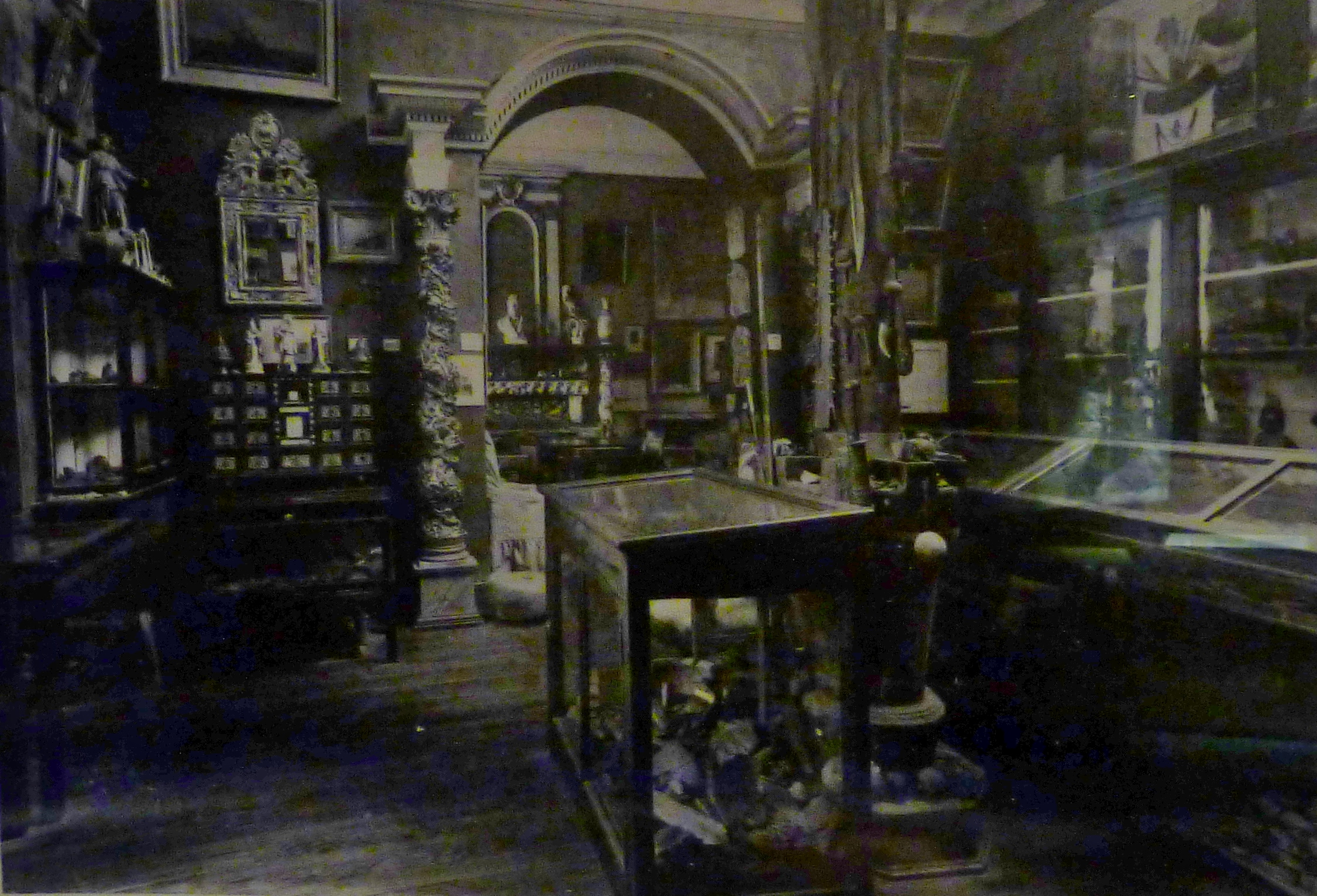 Le musée de Kernuz vers 1900 (photographie de Paul du Chatellier)